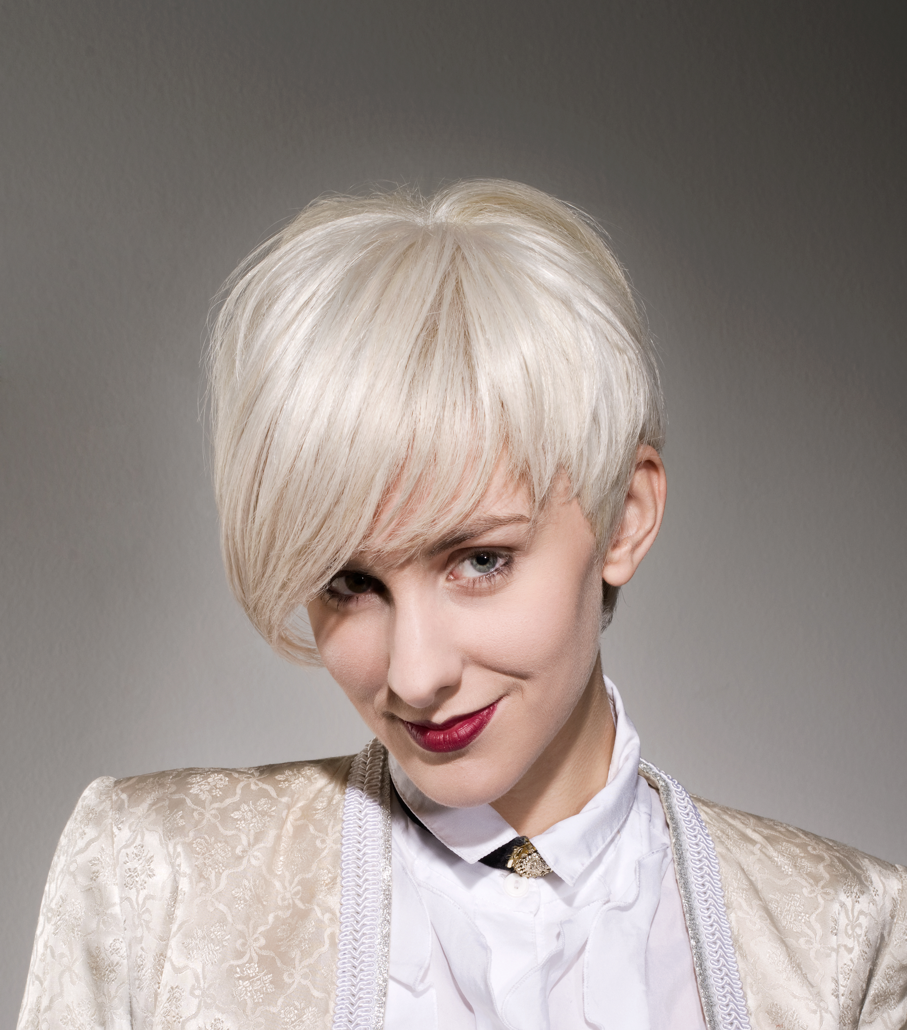 Abdruck honorarfrei, Namensnennung